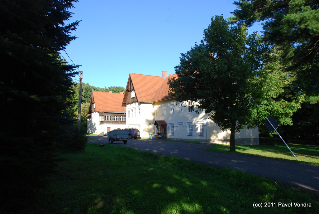 Fotografie hlavní budovy zámečku ze strany od Krušných hor.